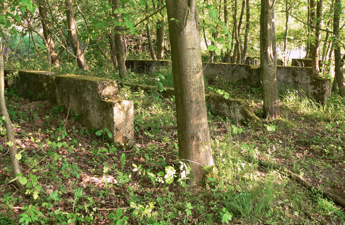 Ruinen des Reichserntedankfestgelände, Ehrentribüne